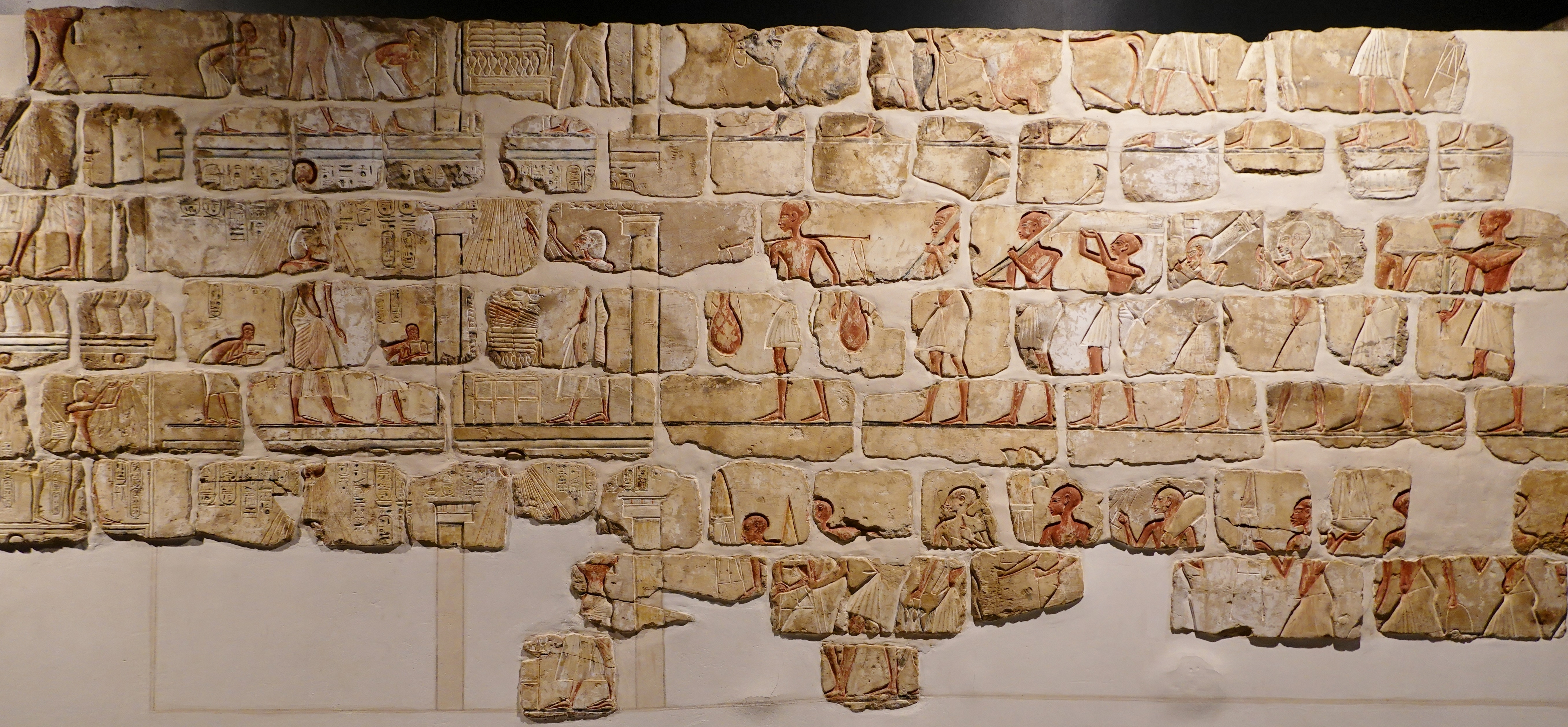 Talatat aus dem Gem-pa-Aton in Karnak, errichtet in den ersten Regierungsjahren des Königs Echnaton (Sandstein, 18. Dynastie), gefunden im 9. Pylon des Amun-Tempels von Karnak, ausgestellt im Luxor-Museum, Ägypten